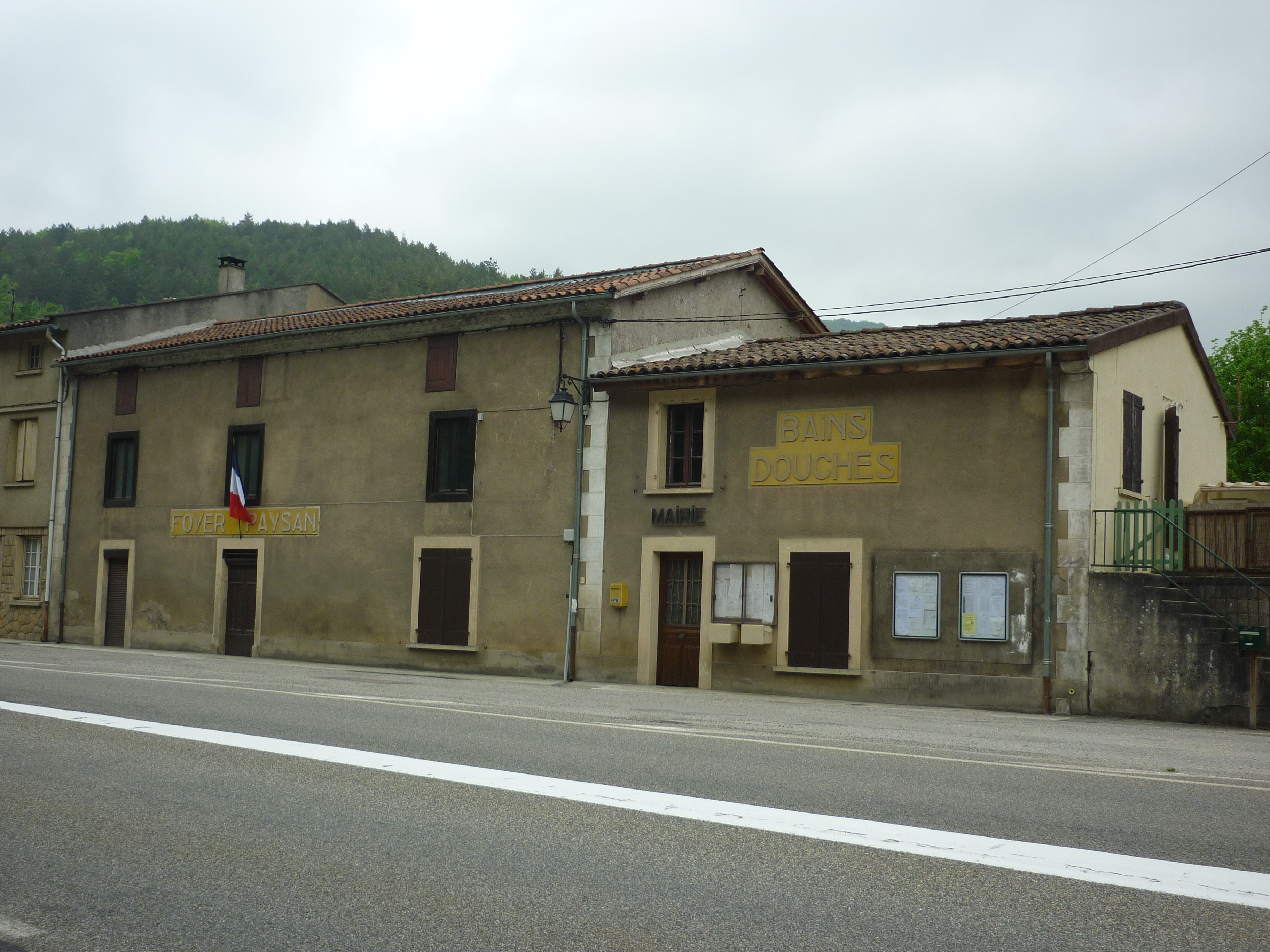 mairie de Celles, département de l'Ariège, France